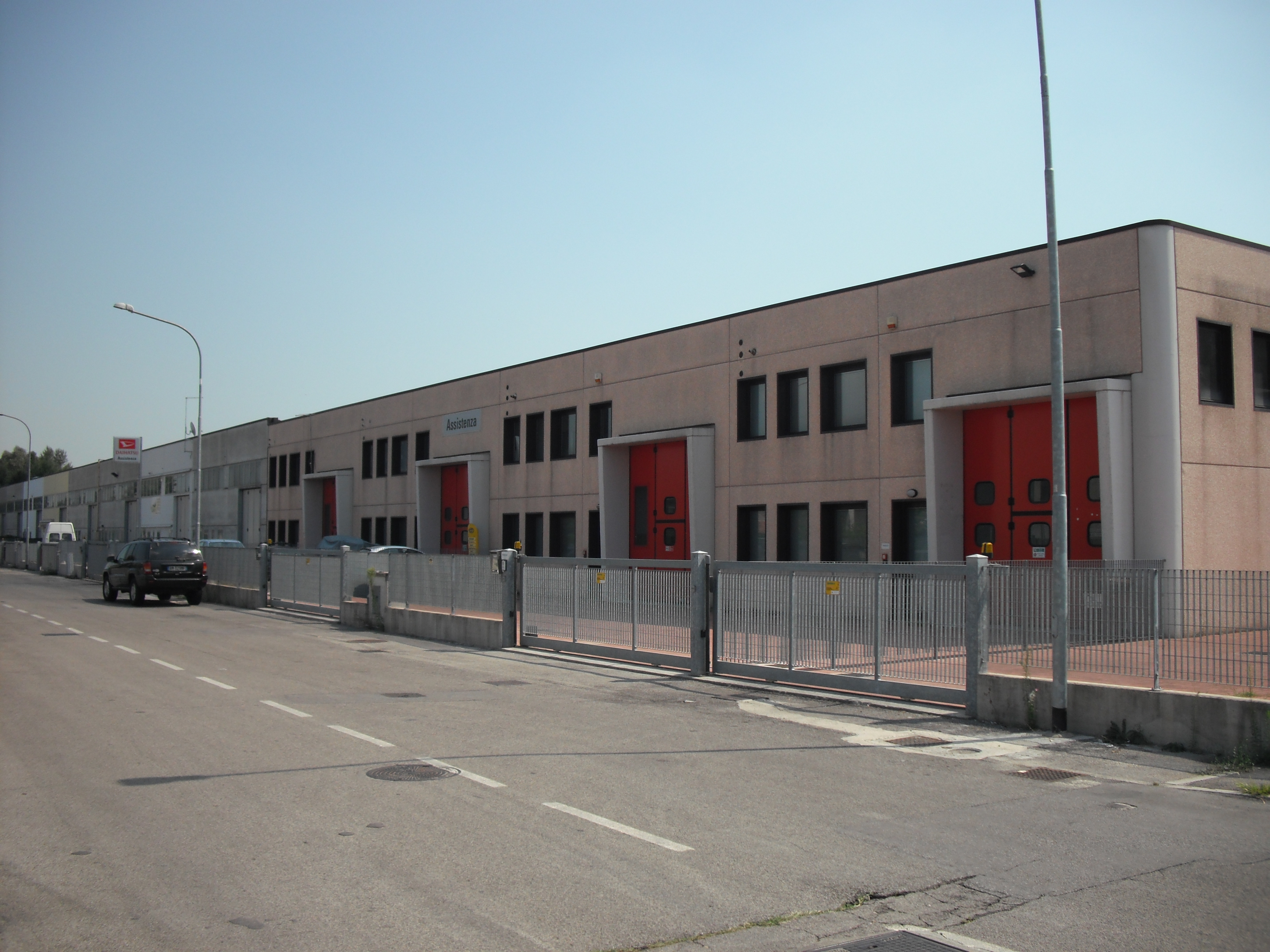 Una strada della zona artigianale di Mogliano Veneto, a sud-ovest rispetto al centro.